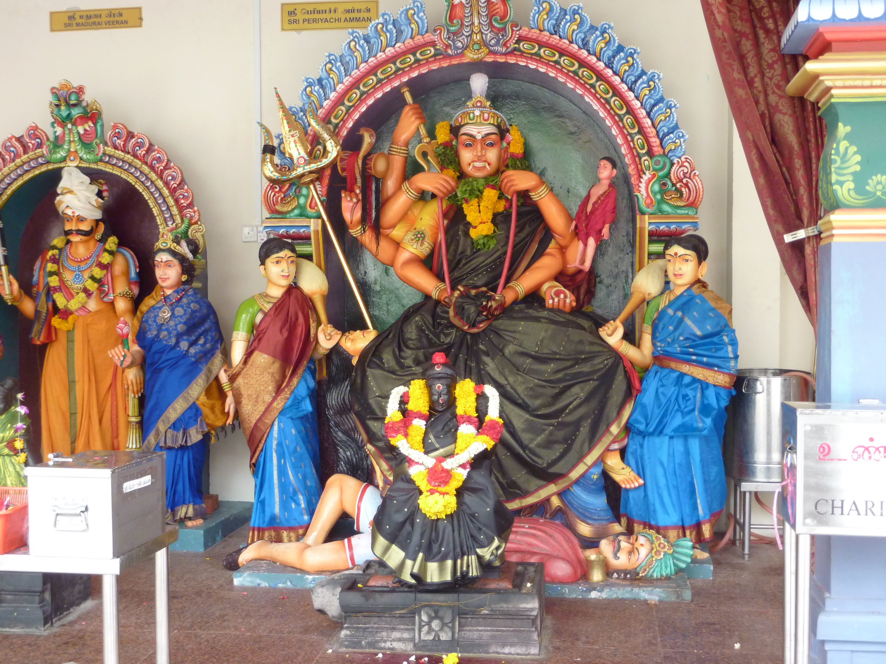 சிங்கப்பூர் மாரியம்மன் கோயில்